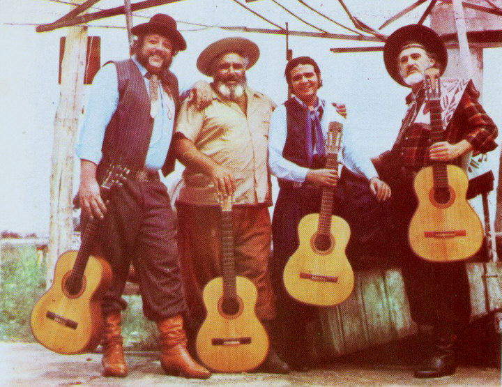 Fotografía de los payadores Jorge Gauna, Juan Carlos Bares, José Curbelo y Waldemar Lagos, aparecida en la revista argentina "Rincón del Payador" publicada en junio de 1980.